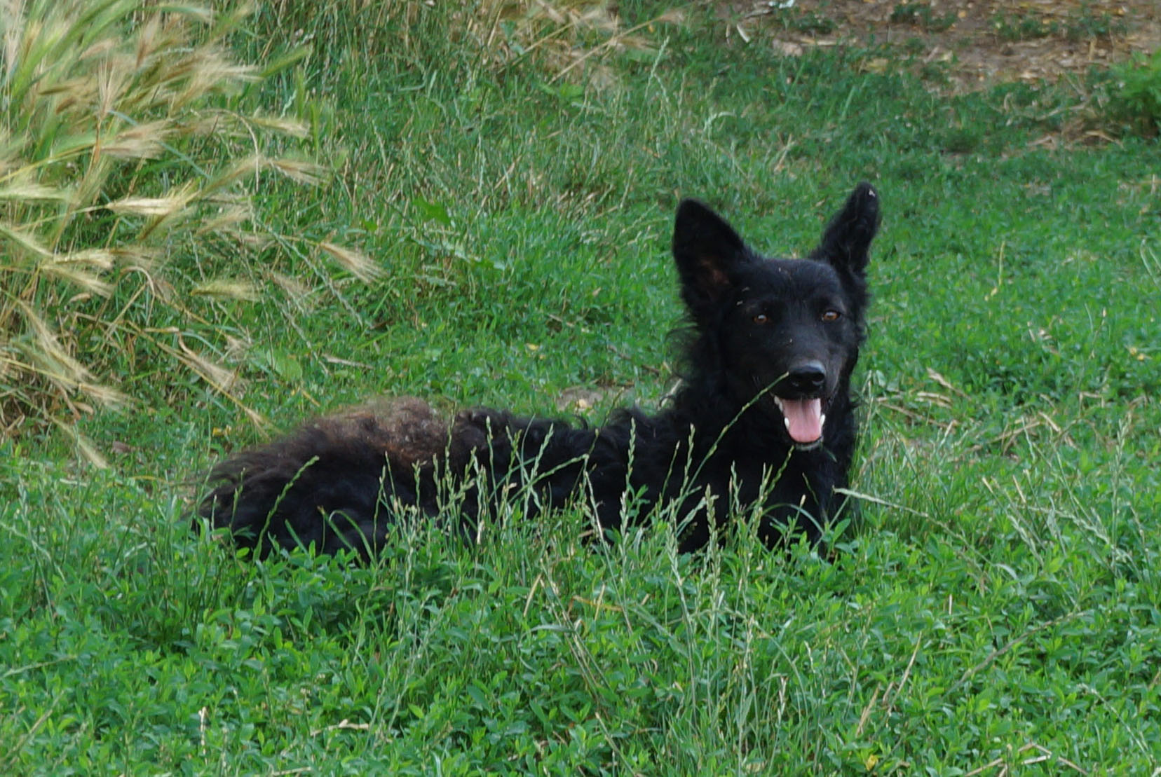 Vojvodjanski pulin